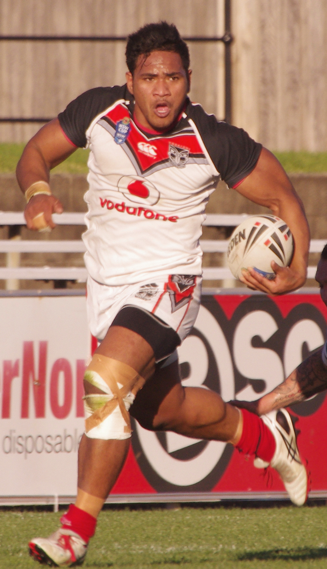 SOLOMONE KATA